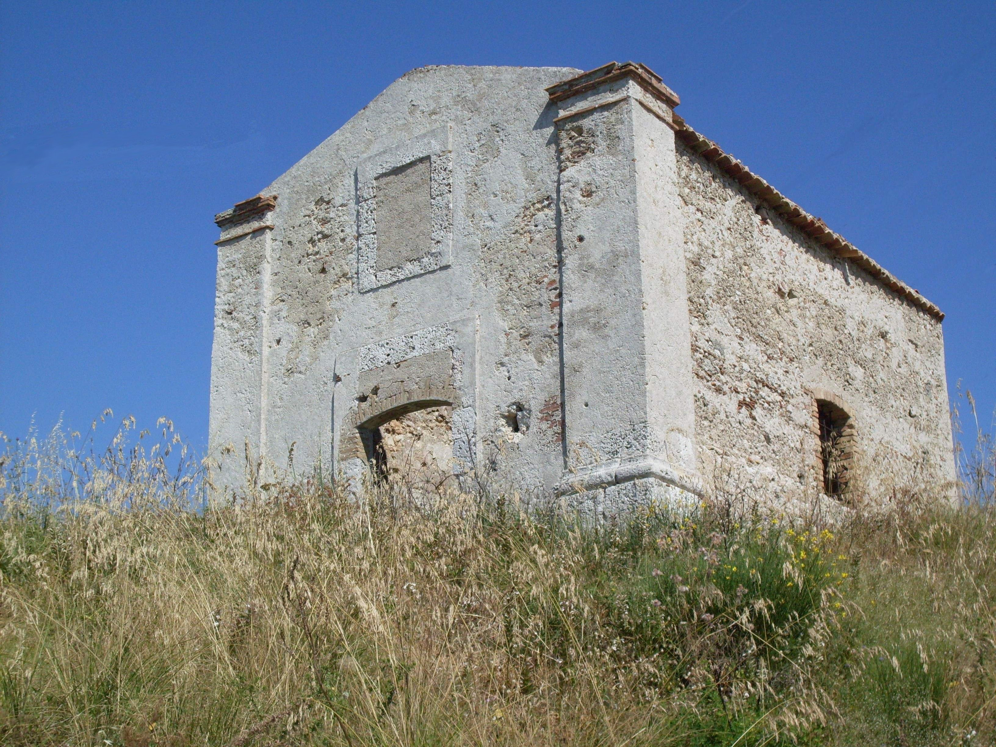 Foto alla chiesetta Gesù e Maria